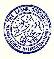 Печат на гръцкото училище в Скопие